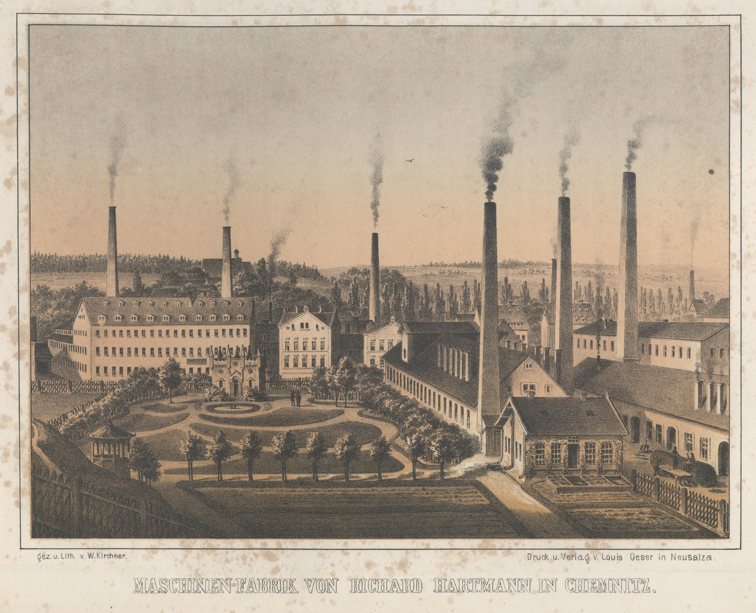 Maschinen-Fabrik von Richard Hartmann in Chemnitz aus: Album der Sächsischen Industrie Erster Band